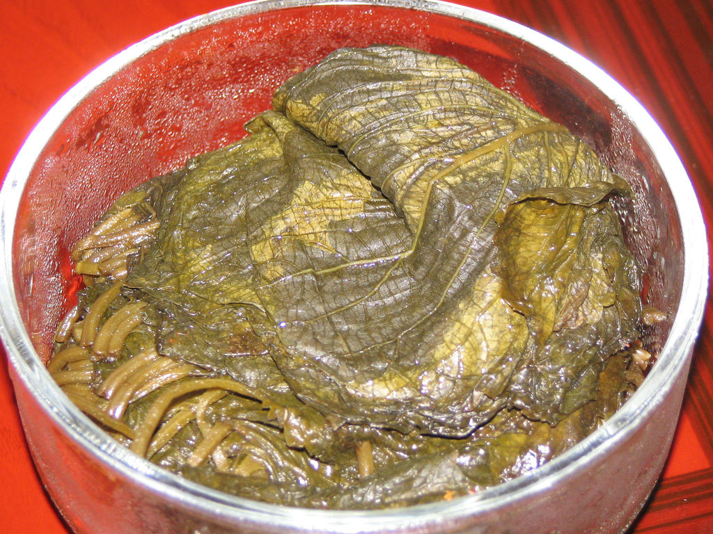 Kkatnip jangakjji (깻잎장아찌), salted perilla leaves